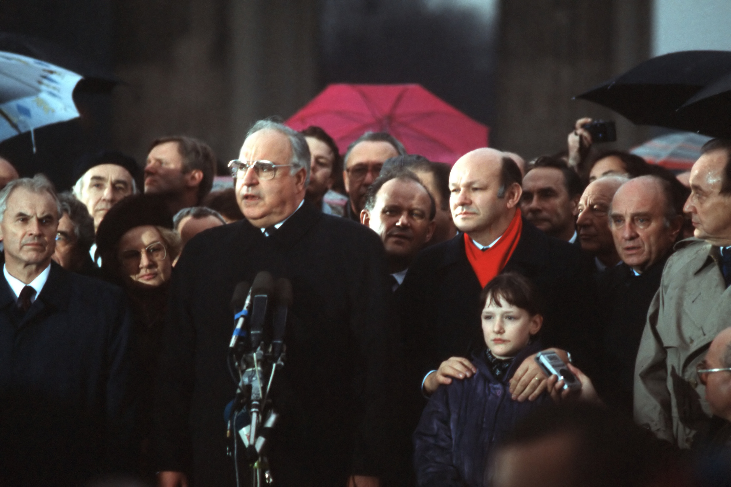 Vorsitzender des DDR-Ministerrates Hans Modrow, Bundesministerin für innerdeutsche Beziehungen Dorothee Wilms, Bundeskanzler Helmut Kohl und der Regierende Bürgermeister Walter Momper (West-Berlin) während der Öffnung des Brandenburger Tores am 22. Dezember 1989. Im Hintergrund zwischen Kohl und Momper der Oberbürgermeister Erhard Krack (Ost-Berlin); vor Momper dessen Tochter Friederike. Rechts daneben: Walter Scheel, Otto Graf Lambsdorff und Hans-Dietrich Genscher. Original caption East German President Hans Modrow, West German Chancellor Helmut Kohl, and West and East BERLIN Mayors Moper [sic] and Giczy [sic] take part in the official opening of the Brandenburg Gate.